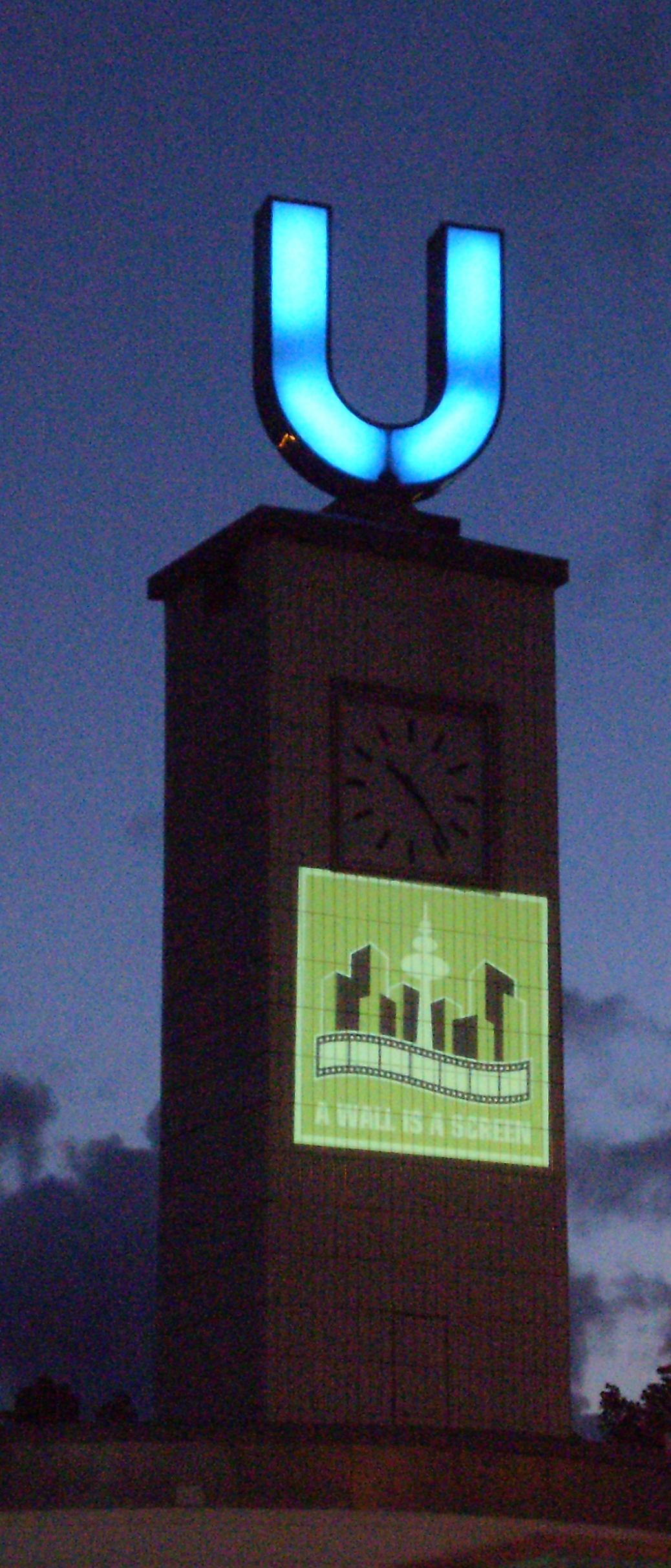 Projektion des Logos von A Wall is a Screen an die Uhr-Säule am U-Bahnhof Feldstraße in Hamburg. Veranstaltung im Rahmen des 28. Internationalen KurzFilmFestivals Hamburg.